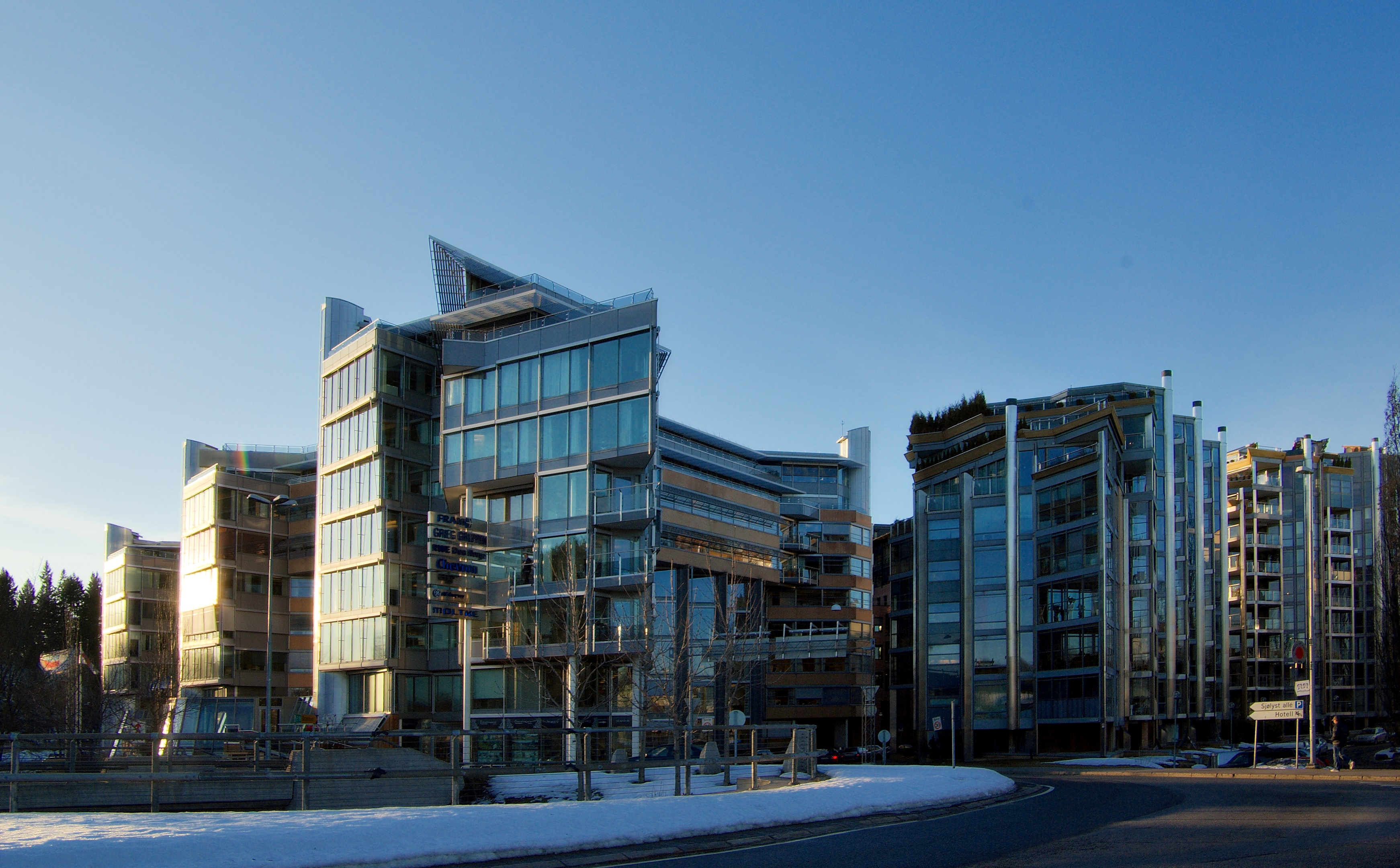 Karenslyst Alle 2, Sjølyst, på Skøyen i Oslo